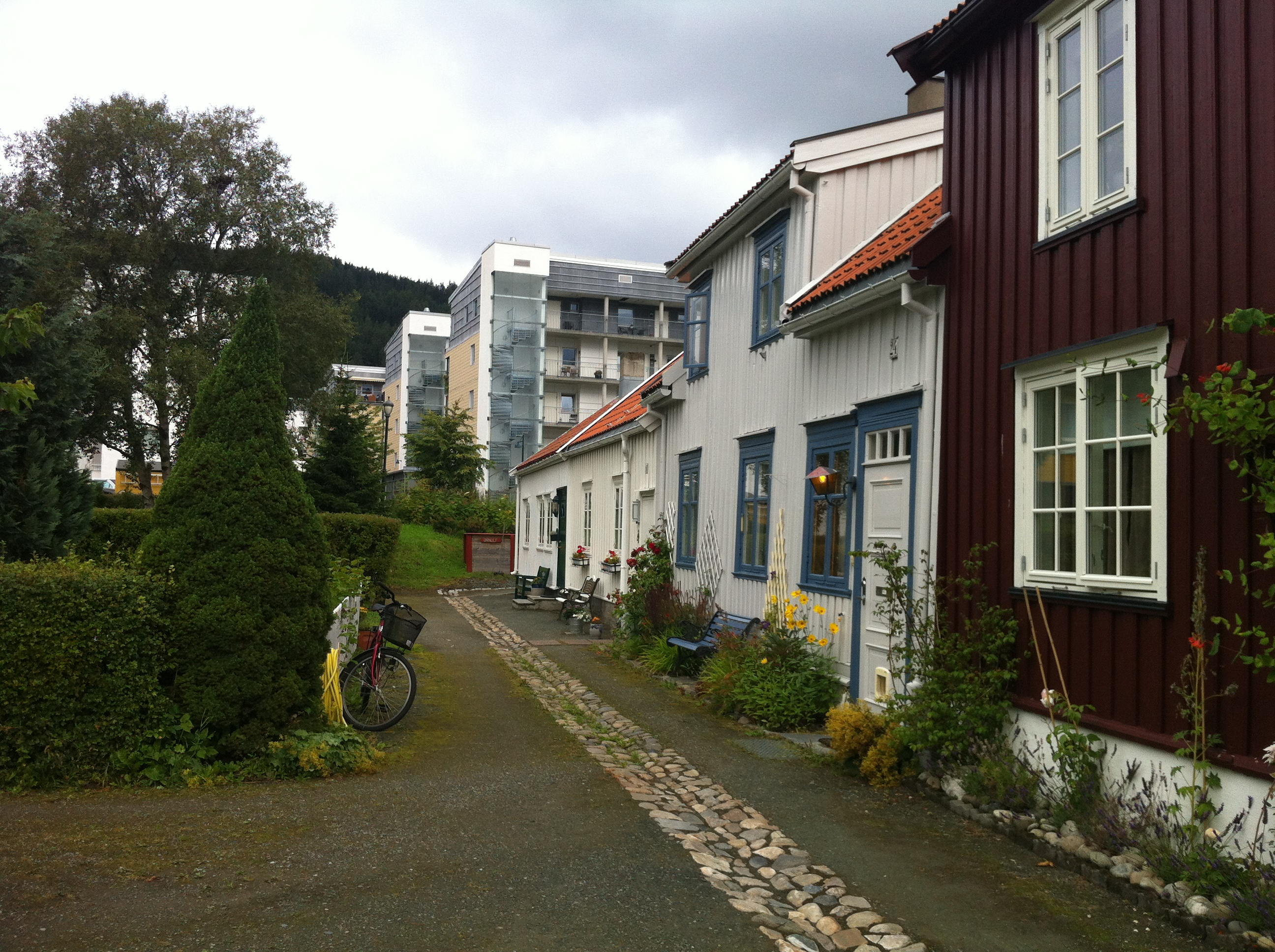 Norsk (bokmål): Bilde av trehusbebyggelsen i Ilsvikøra, Trondheim. August 2012.